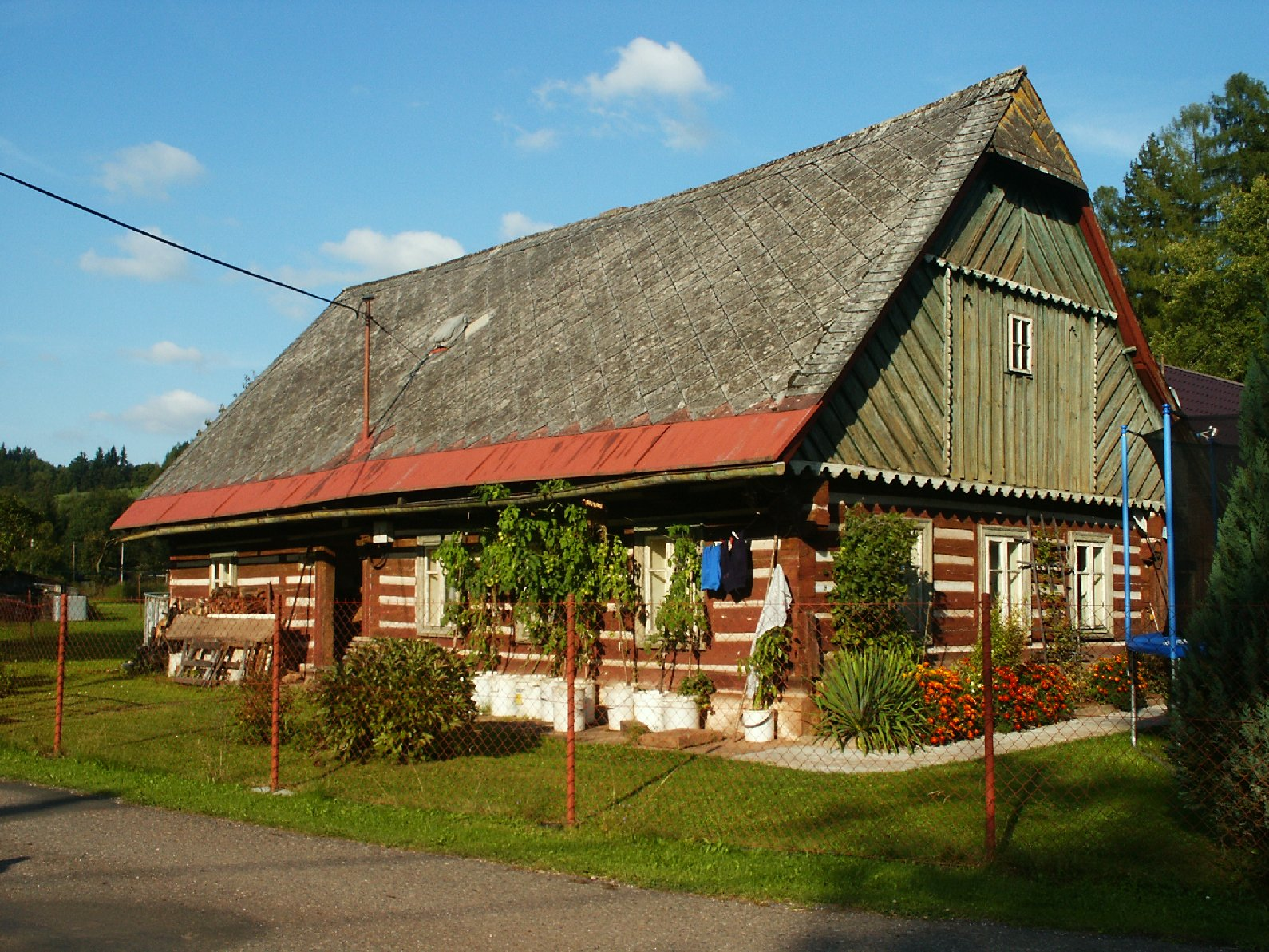 Venkovská usedlost (Arnultovice), Arnultovice 26